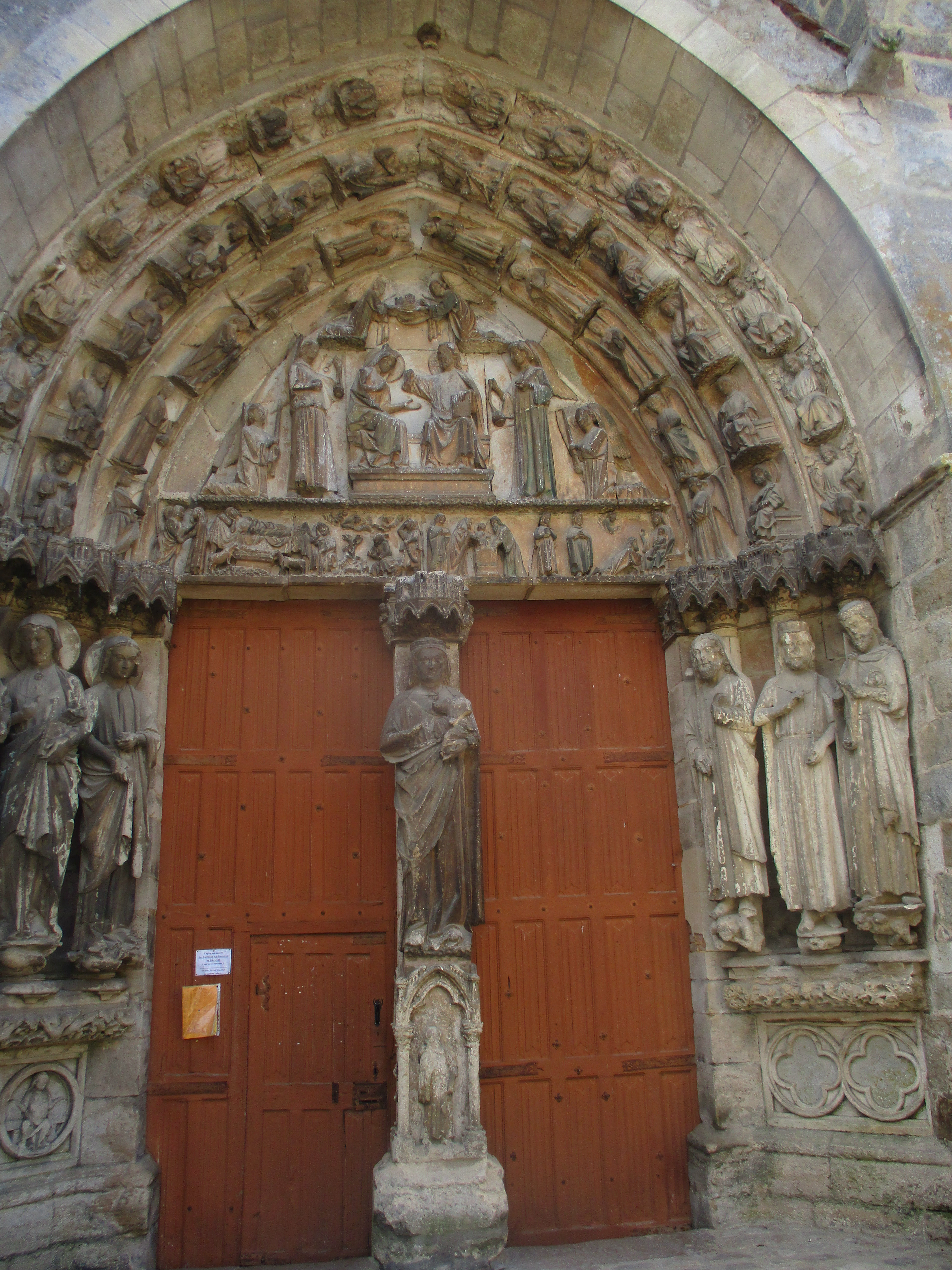 Portal of Église Notre-Dame de Villeneuve-l'Archevêque